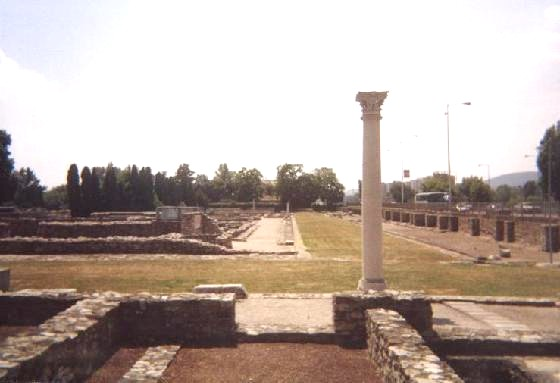 Aquincum, Budapest, Hungary